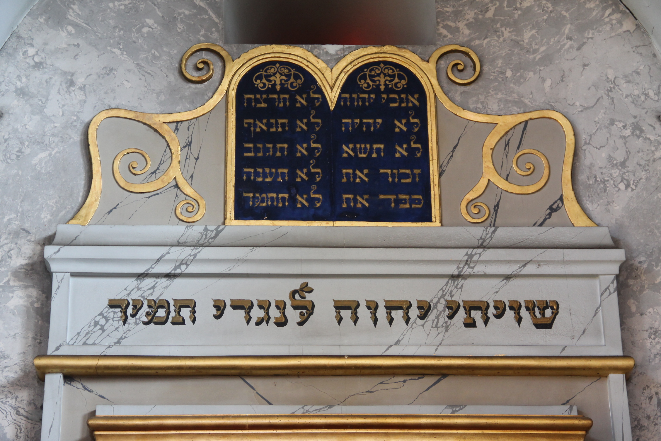 Tables de la Loi et corniche surmontant l'armoire à rouleaux de Tora